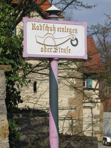 Historisches Verkehrszeichen aus Gusseisen, das vor starkem Gefälle zum Anlegen des Hemmschuhs bei Pferdefuhrwerken und Pferdekutschen bei hoher Strafe auffordert, um das Fuhrwerk genügend abzubremsen. Standort: An der Schlosskelter in Beihingen, einem Stadtteil der Stadt Freiberg am Neckar im Landkreis Landkreis Ludwigsburg in Baden-Württemberg. Inschrift: "Radschuh einlegen oder Strafe"